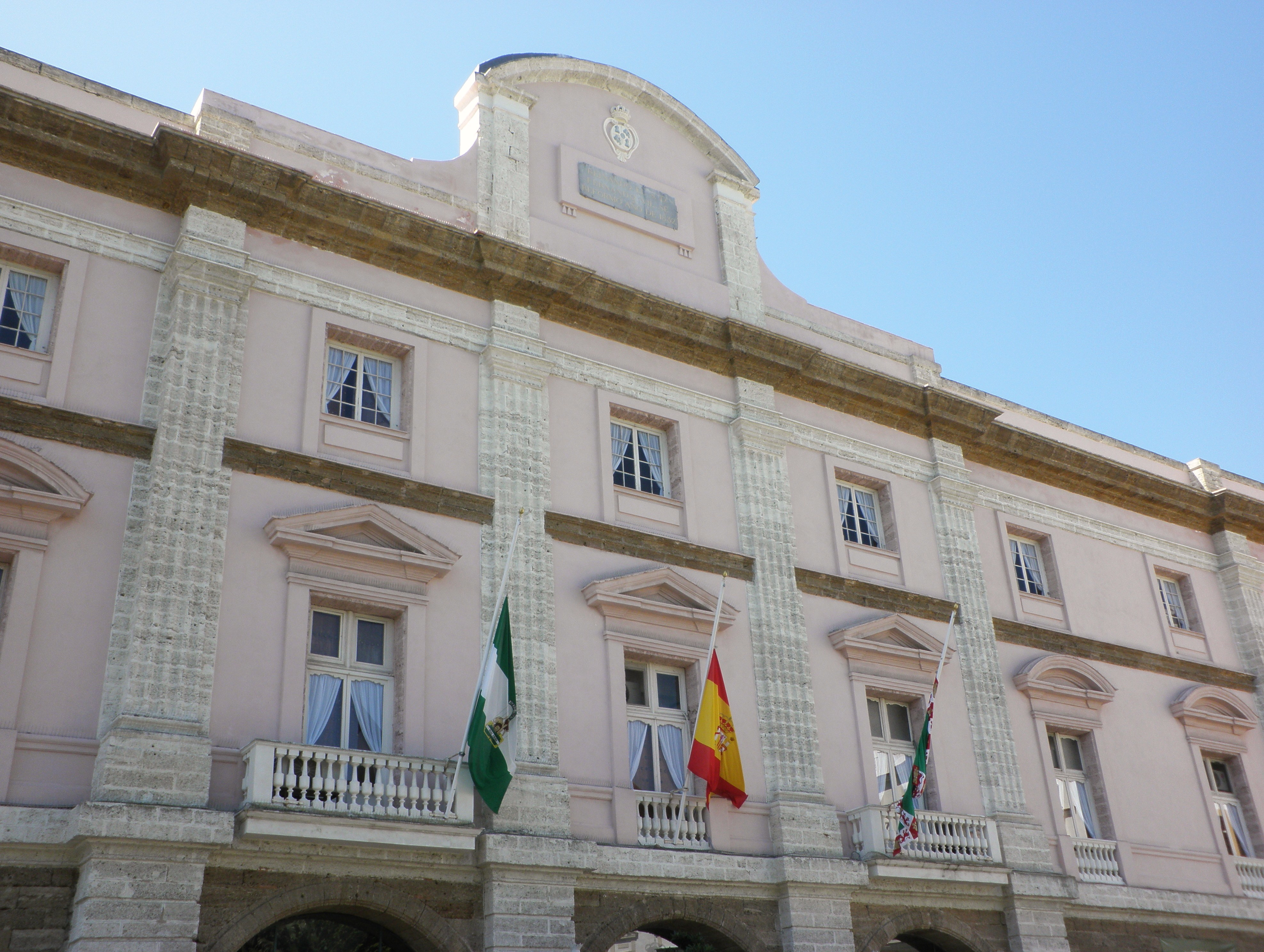 Palacio de la Aduana (s. XVIII), Cádiz, España